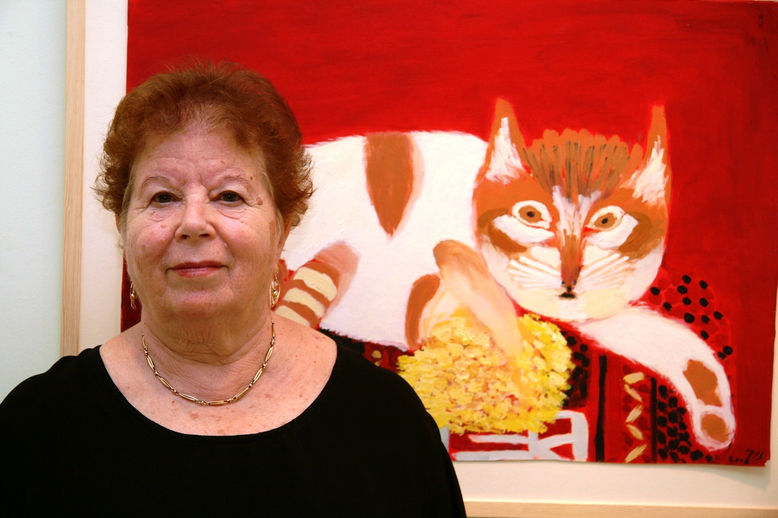 זוקי קריסטל בתערוכת "חתולים"